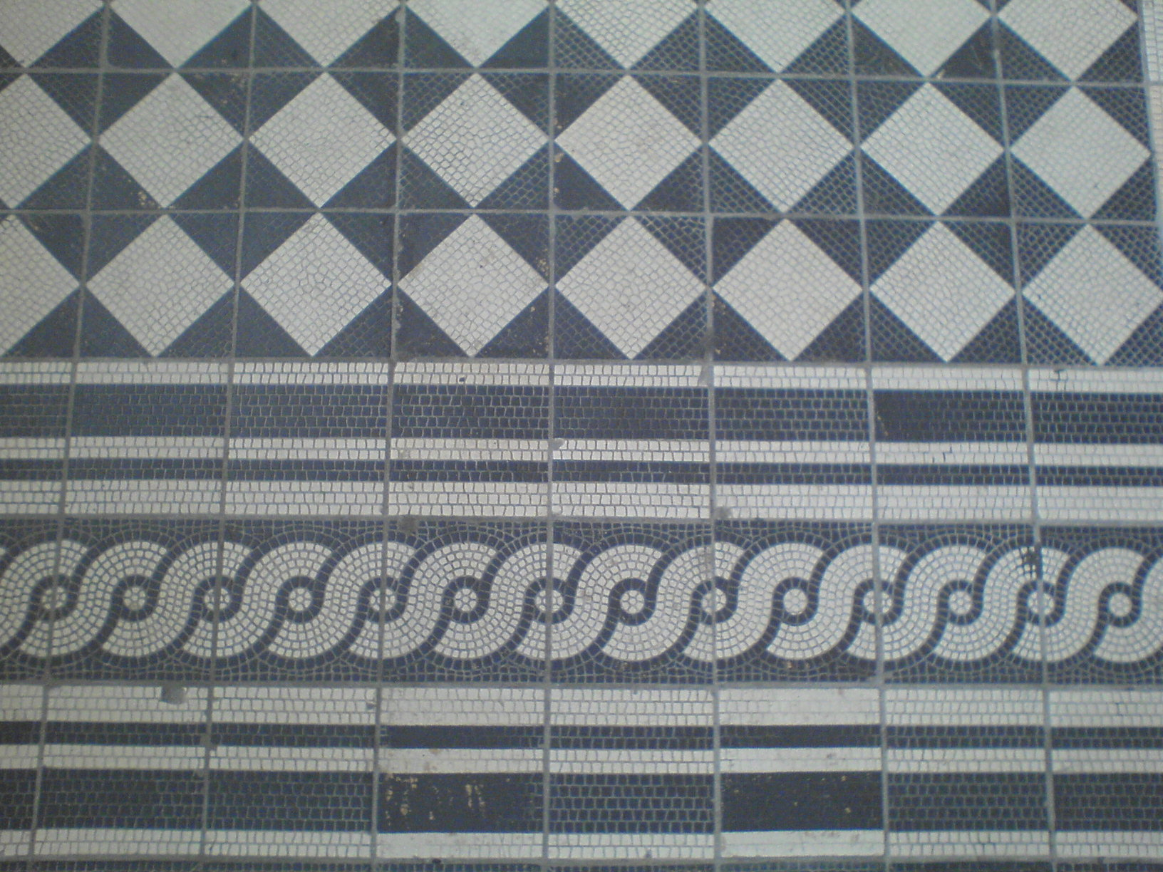 Bodenfliesen im Wiener U-Bahnhof Hietzing